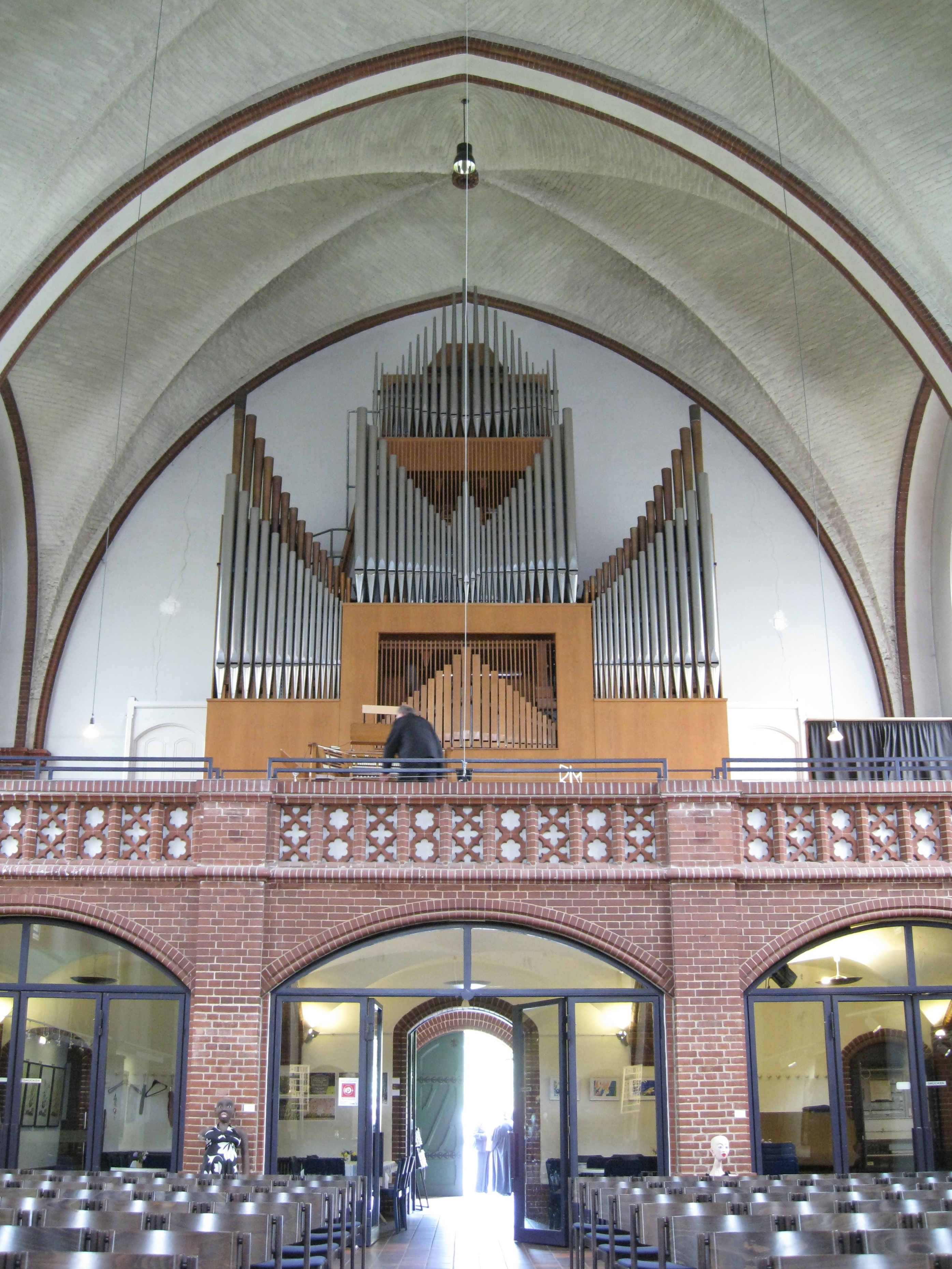 Orgel der Petruskirche am Oberhofer Platz in Berlin-Lichterfelde